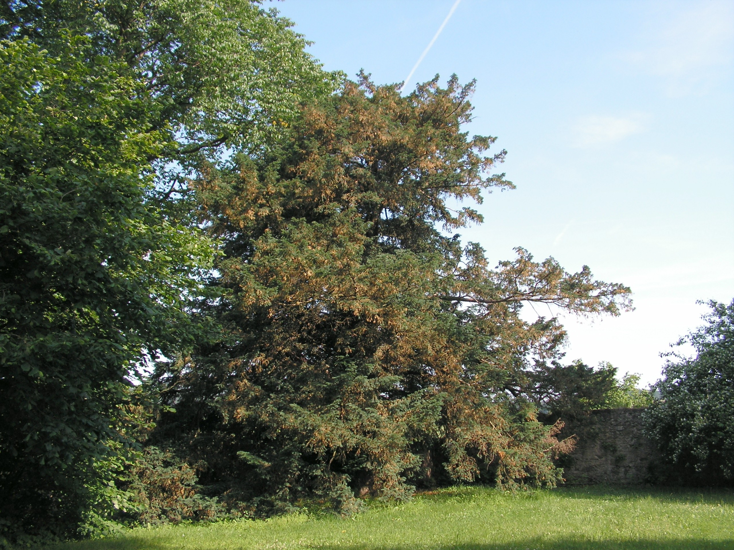 Vilémovický tis se nachází v zámecké zahradě ve Vilémovicích v okrese Havlíčkův Brod.